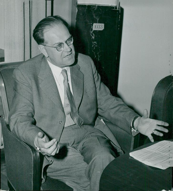 Prime Minister Tage Erlander